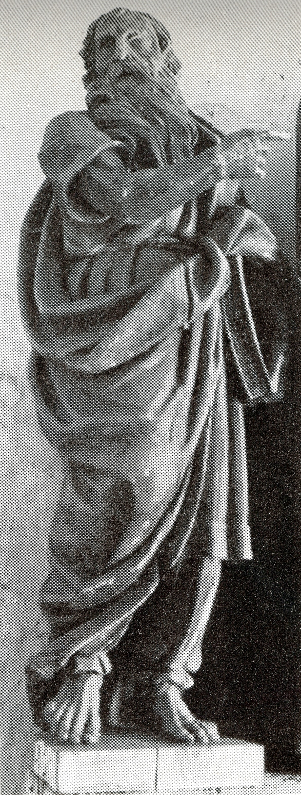 Gr.-Wolfsdorf, Evangelische Pfarrkirche, Altaraufsatz, Gestalt des Moses (?), 1715-1716, Bildhauer Joseph Anton Kraus (zugeschrieben)